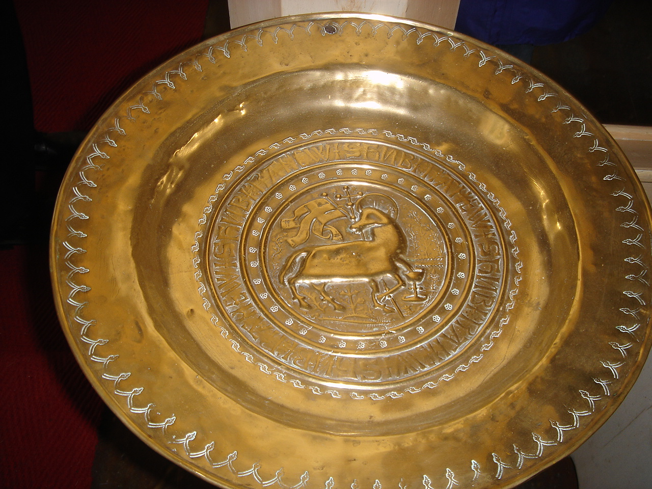 Dåpsfatet i Kvamsøy kyrkje, Kvamsøy kirke, Kvamsøy Church